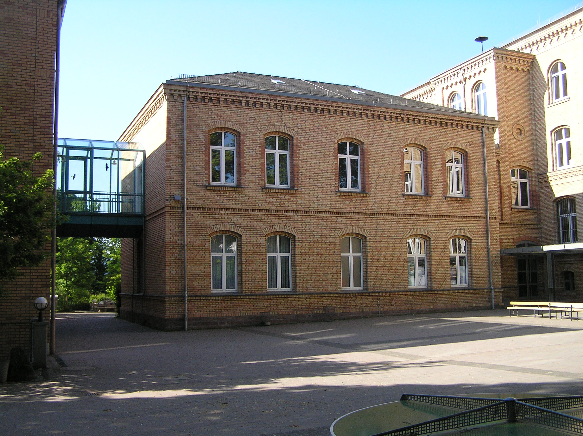 Christian Wirth Schule Usingen: Seitenansicht des Zentralgebäudes mit Brücke zum Neubau